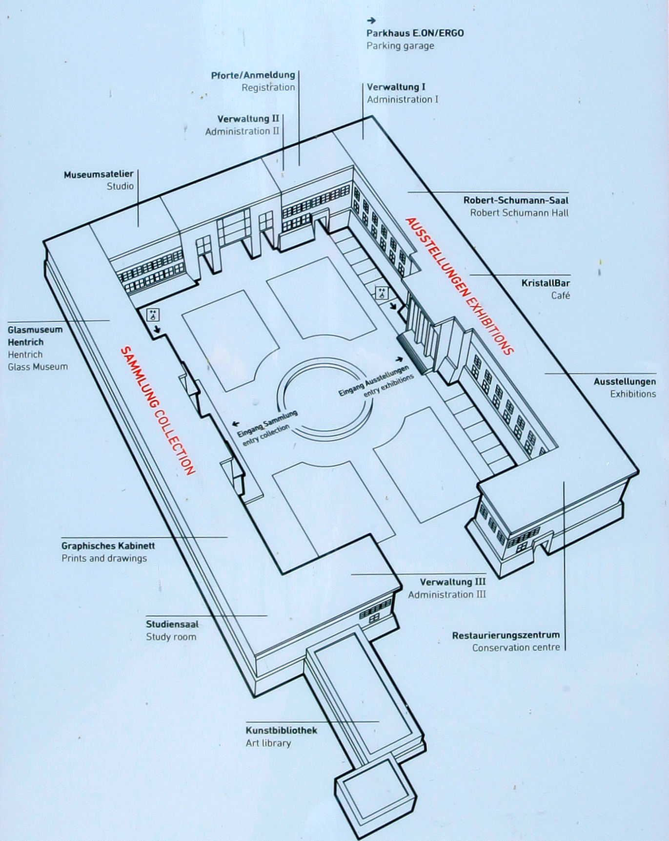 Ehrenhof mit Museum Kunstpalast in Düsseldorf. Lageplan, Ausschnitt einer Informationstafel.